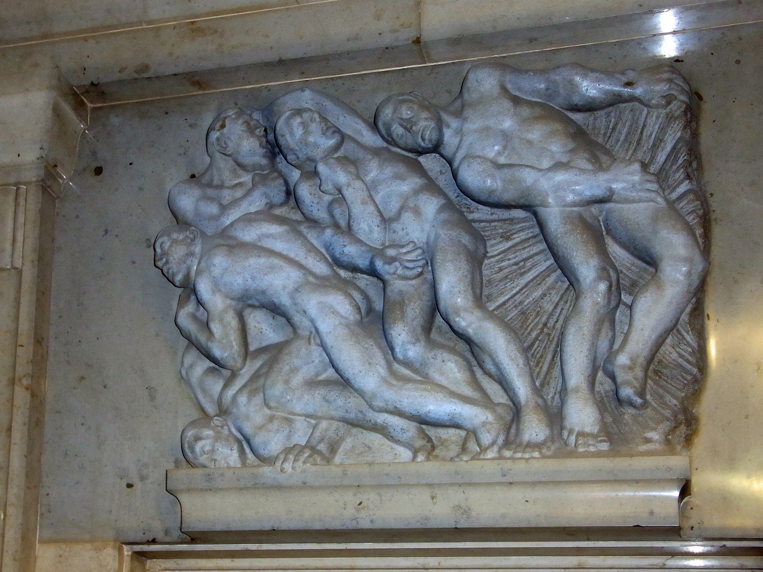 Verwaltungsgebäude der ehemaligen Union, AG für Bergbau, Eisen- und Stahl-Industrie: EingangstreppenhausThis is a photograph of an architectural monument. 0327